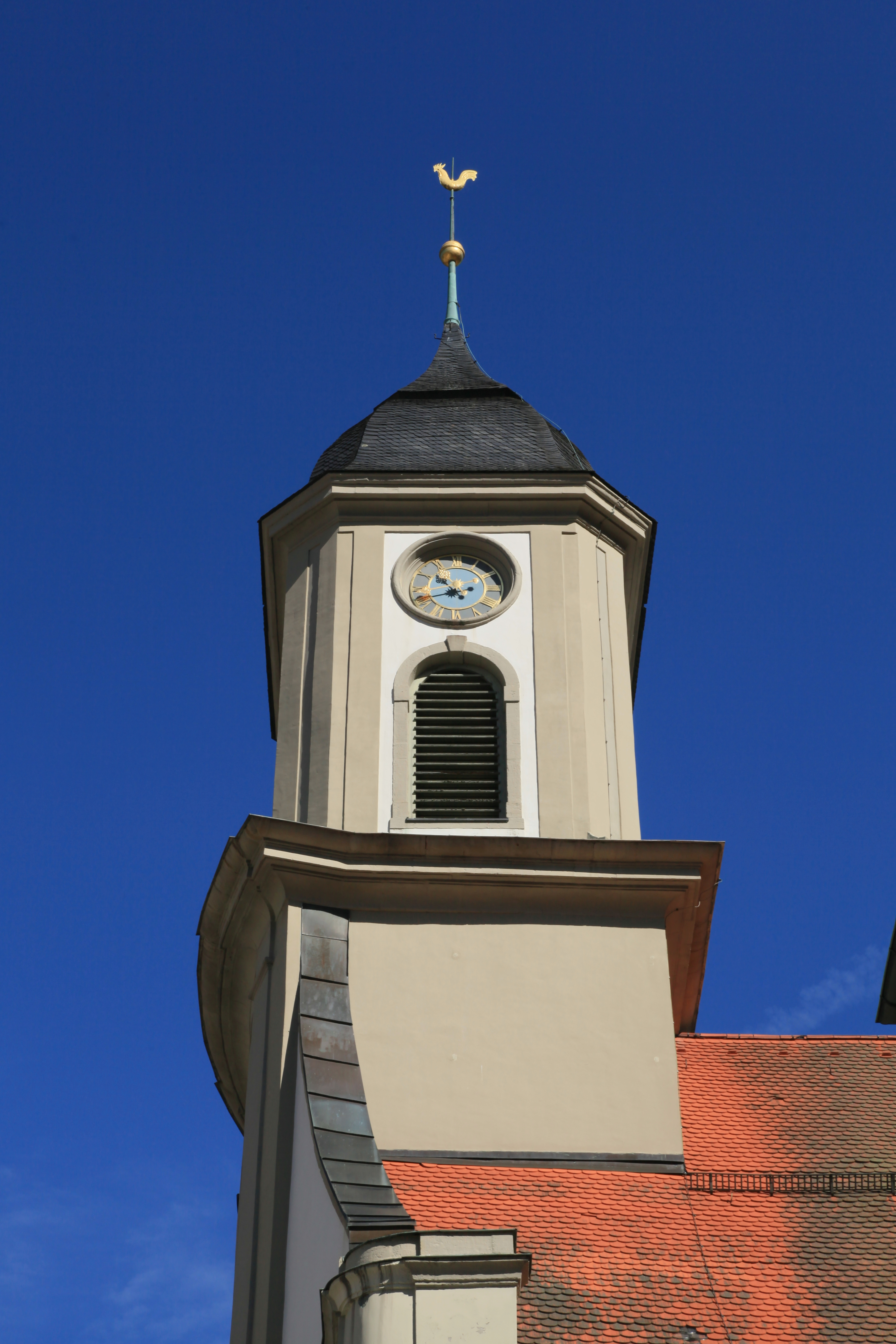 Stadtkirche, Kurplatz in Bad Wildbad